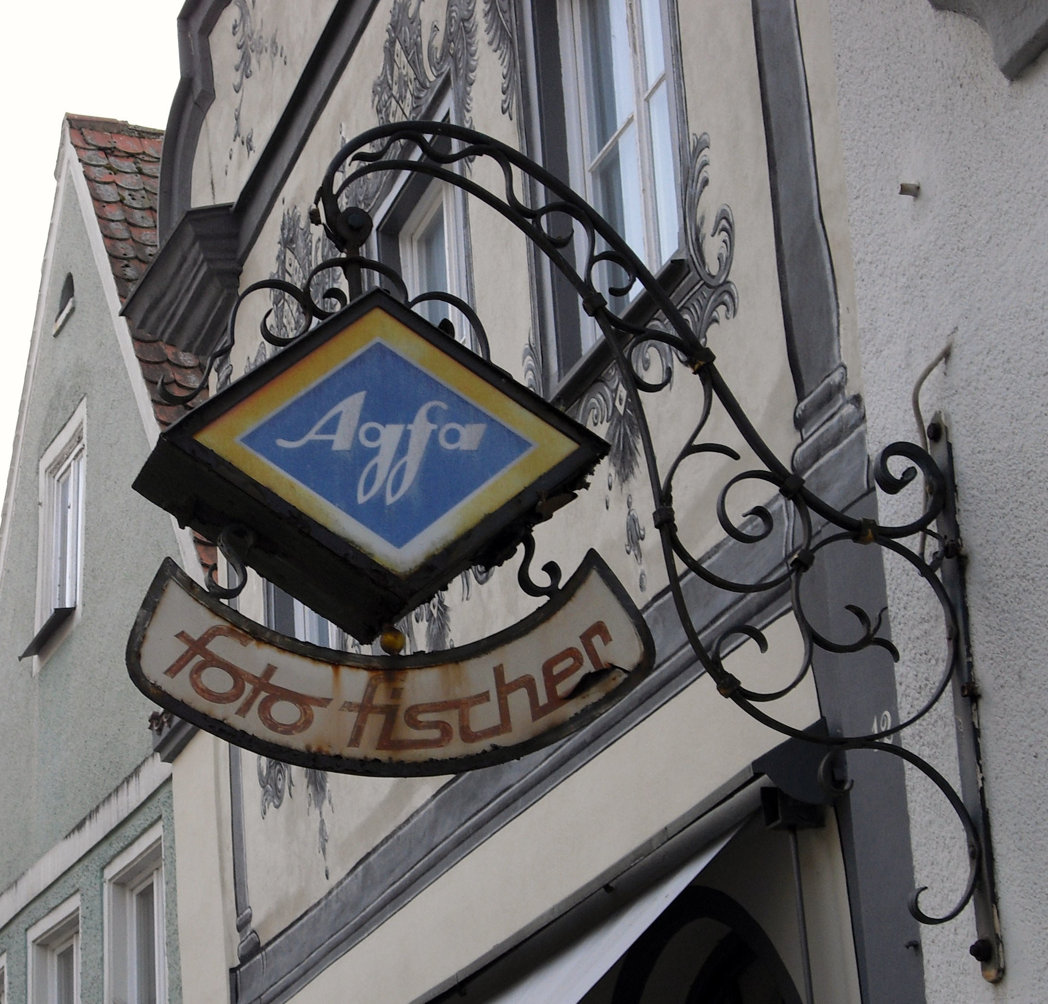 AGFA-Reklame an einem Fotogeschäft in Öttingen (Bayern)